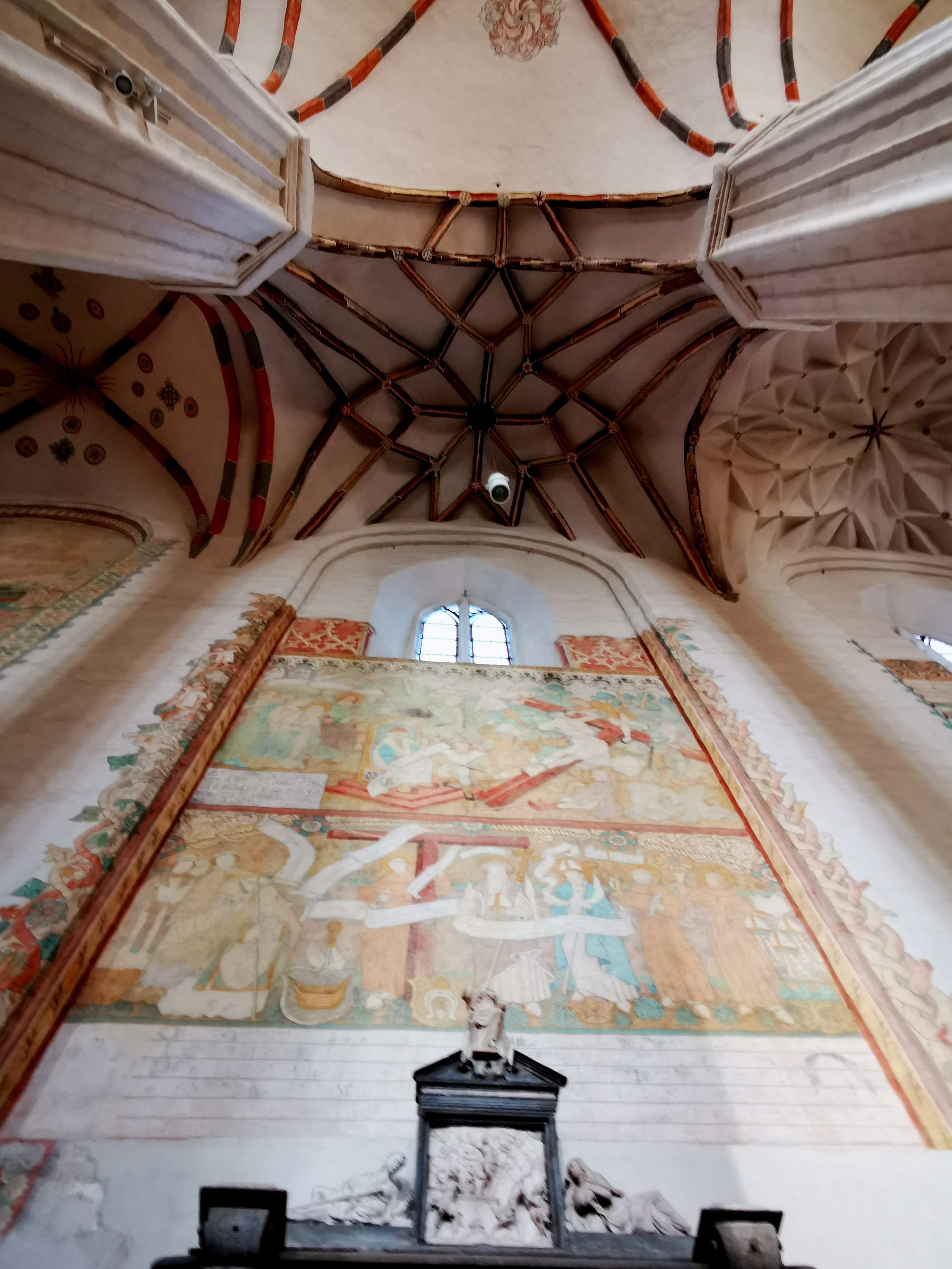 Bernardinų bažnyčios gotika ir tapyba